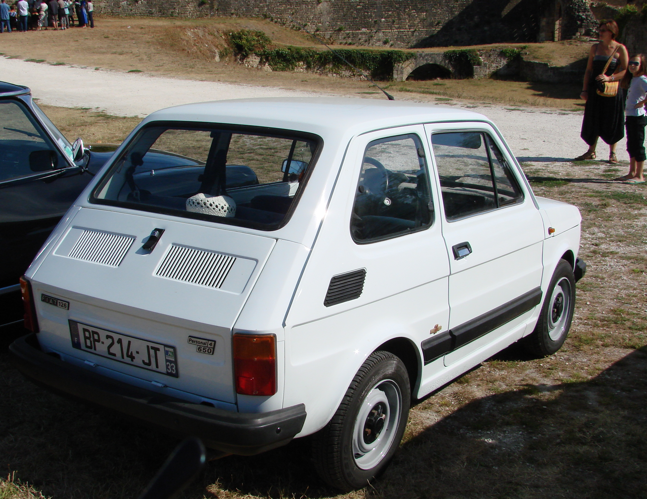 Fiat 126 Personal 4 650 en 2012